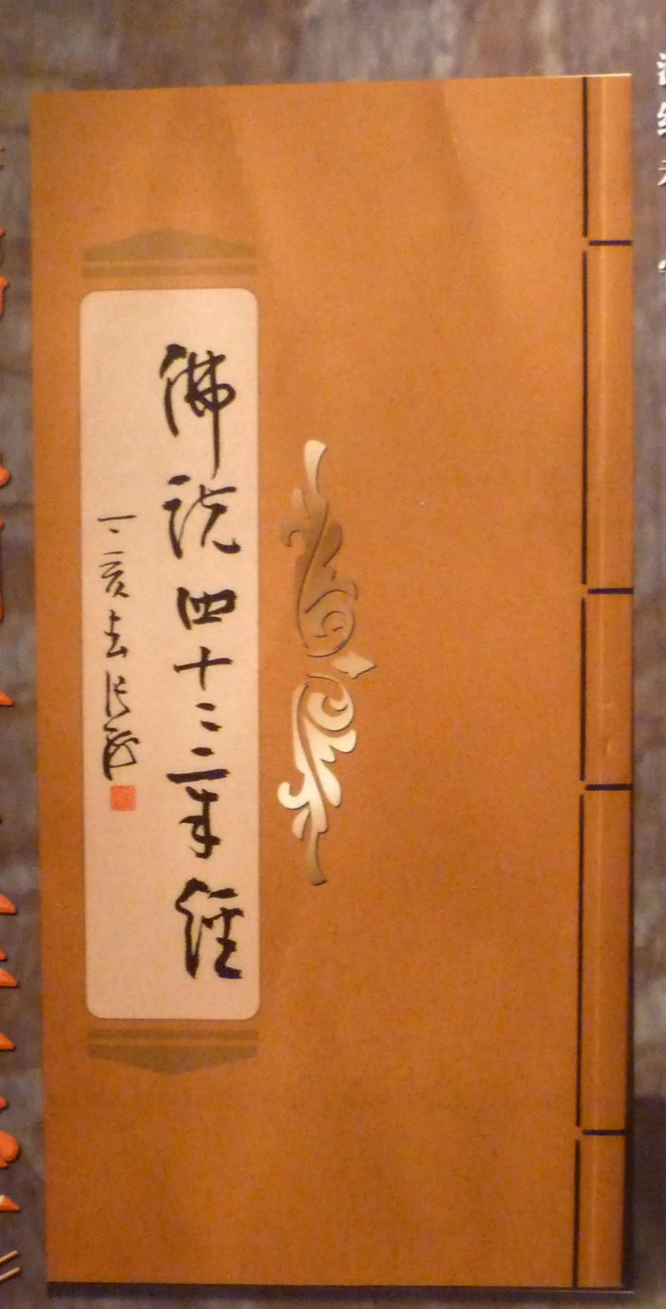 佛说四十二章经(Sutra of Forty-two Chapters)